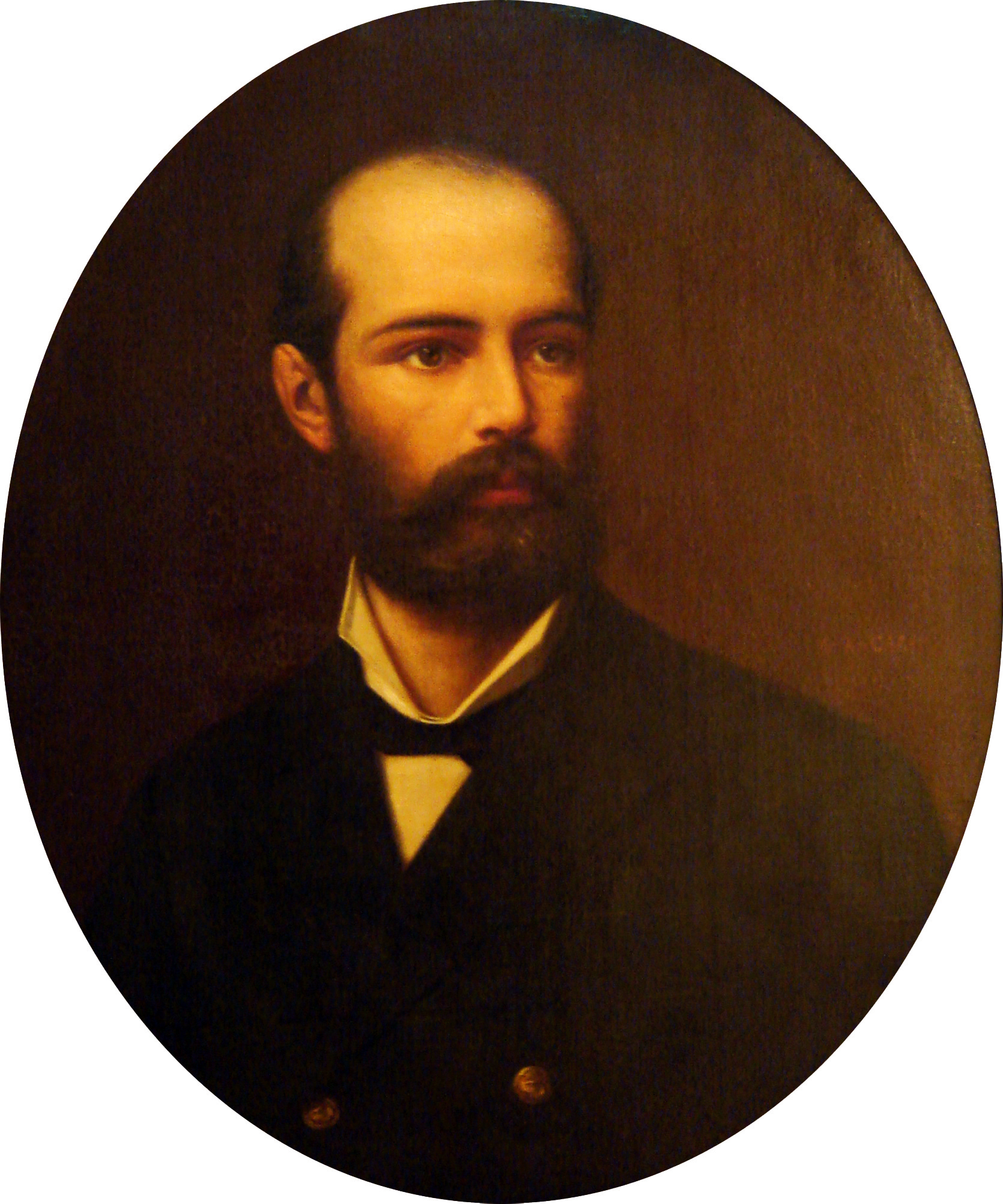 "Capitán de Fragata Arturo Prat" por Manuel Antonio Caro.